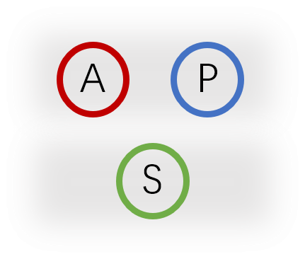 中文（中国大陆）: 句法形态配列，S-A-P